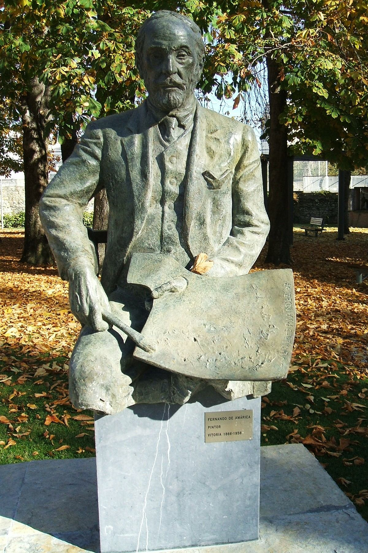 Estatua del pintor Fernando de Amárica, en el Museo de Bellas Artes de Vitoria-Gasteiz